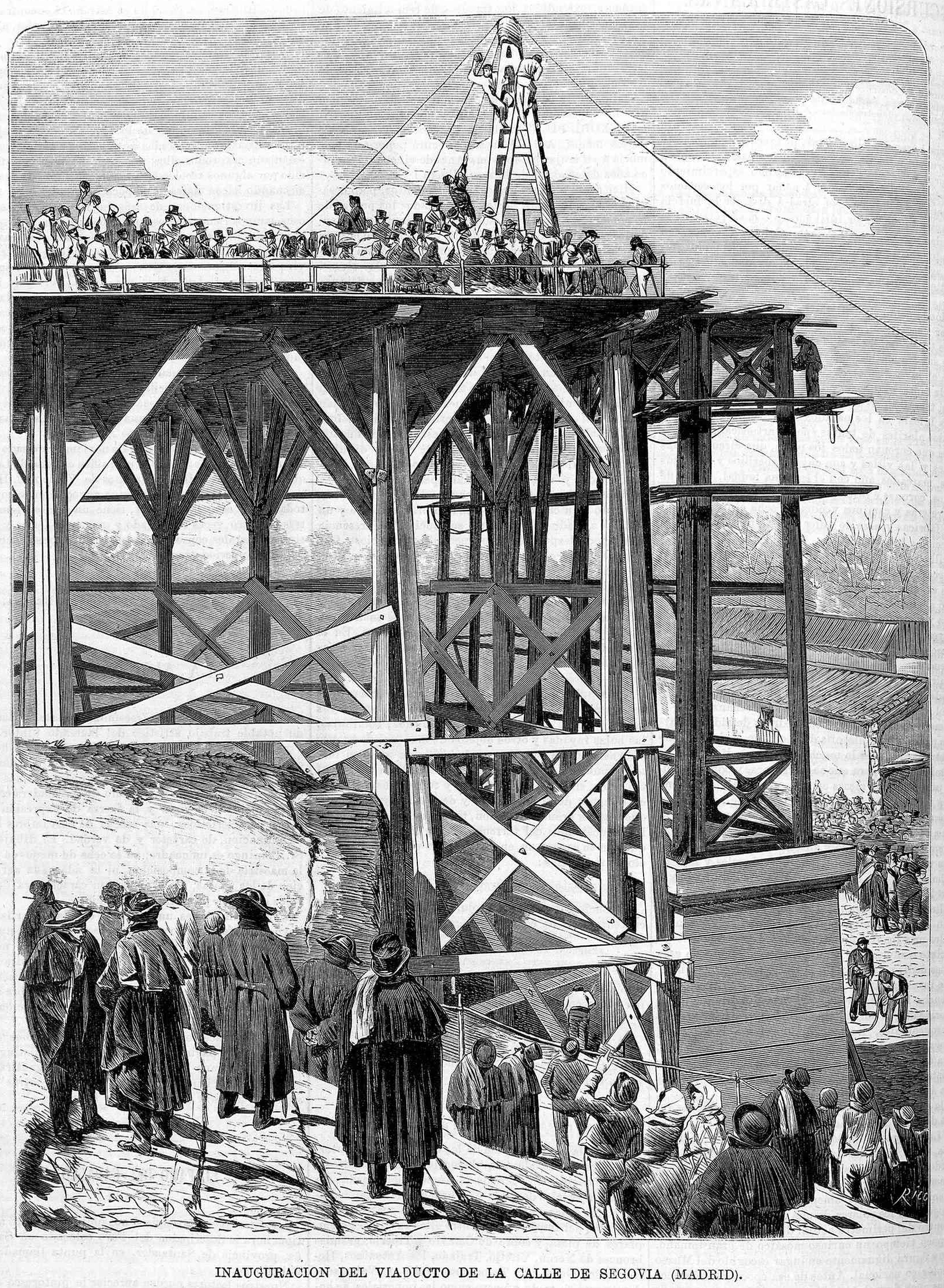 Inauguración del viaducto de la calle Segovia, La Ilustración de Madrid.